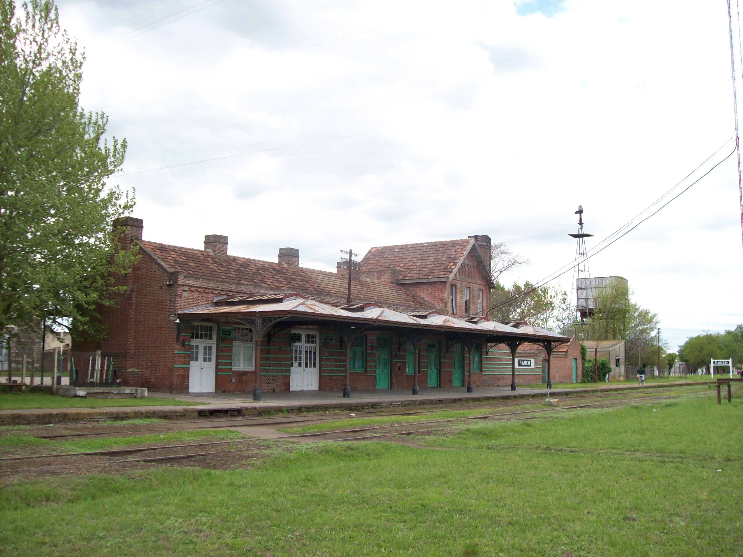 Vías y edificio de la Estación Rauch, Provincia de Buenos Aires, Argentina.